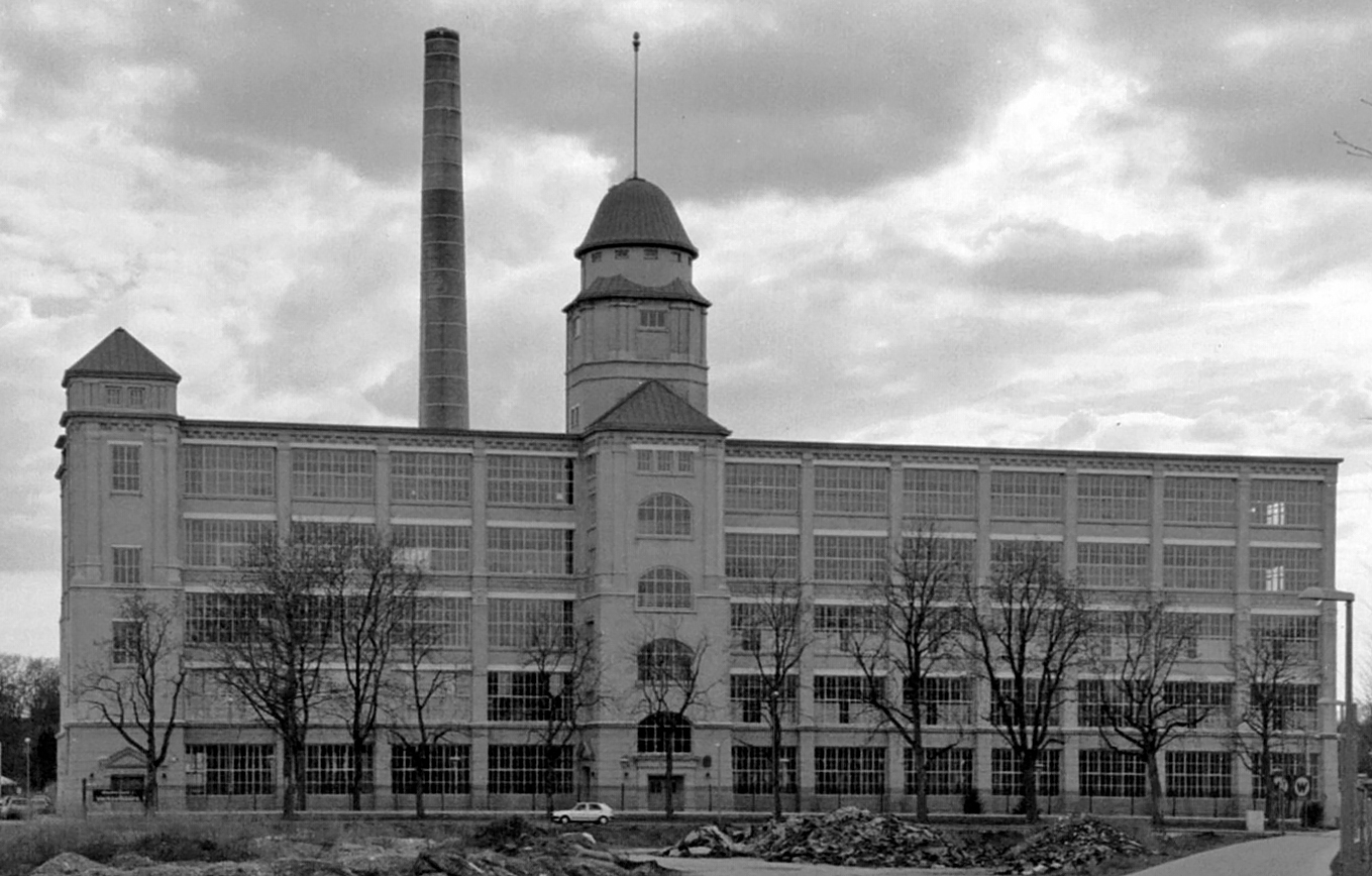 Nordfront des Glaspalastes